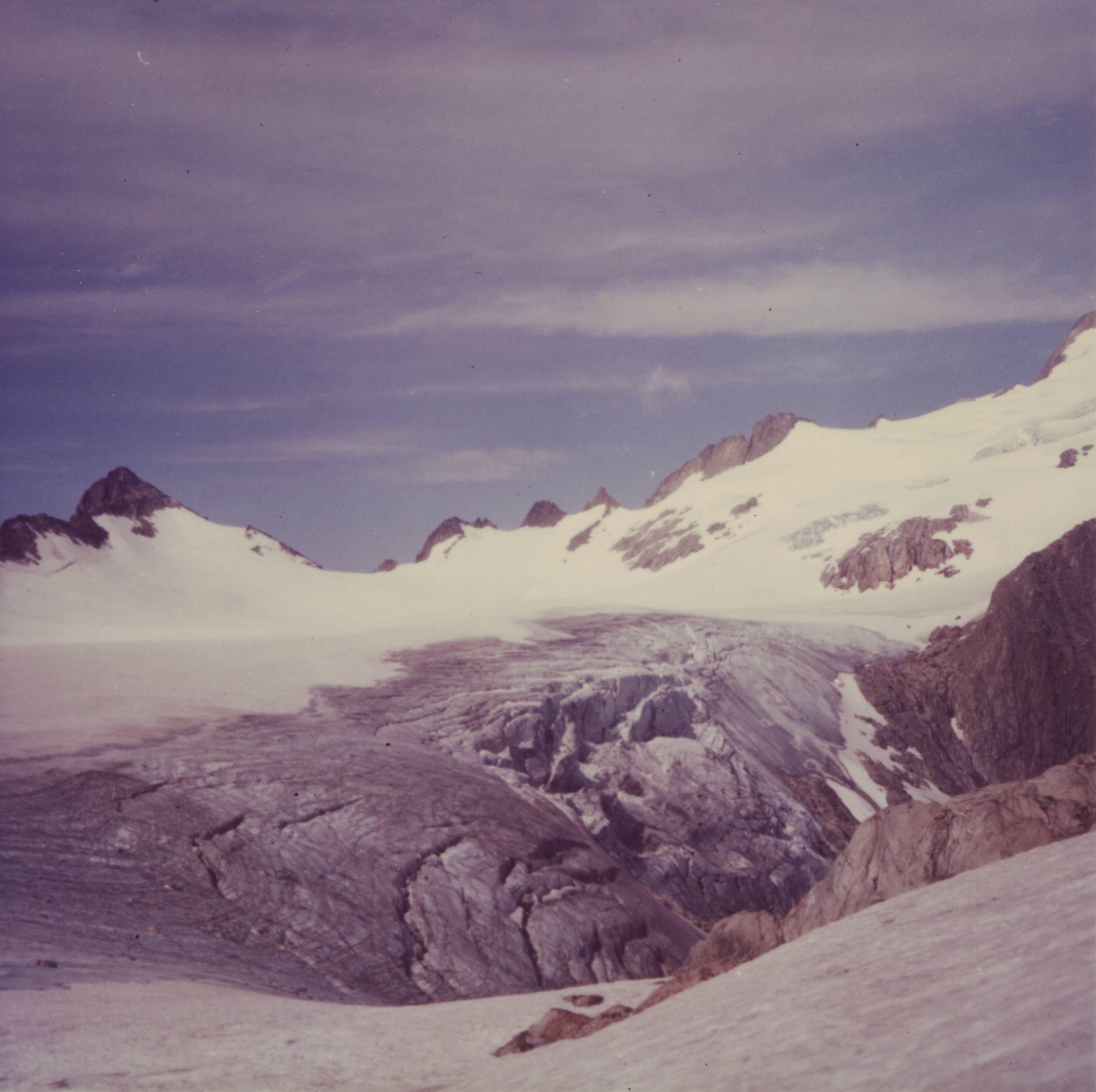 Brunni Glacier, Maderanertal, Switzerland, in July 1971 - Brunni-Glačero, Maderanertal, Svislando, en julio 1972